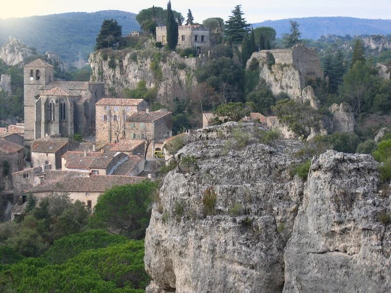 Description: Village de Mourèze, au coeur du Cirque dolomitique du même nom. Hérault, France. Source: Hugo Soria Licence: GFDL Hugo Soria